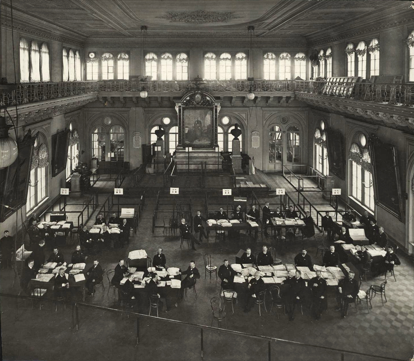 Работа комиссии по подсчету голосов избирателей Государственной Думы.